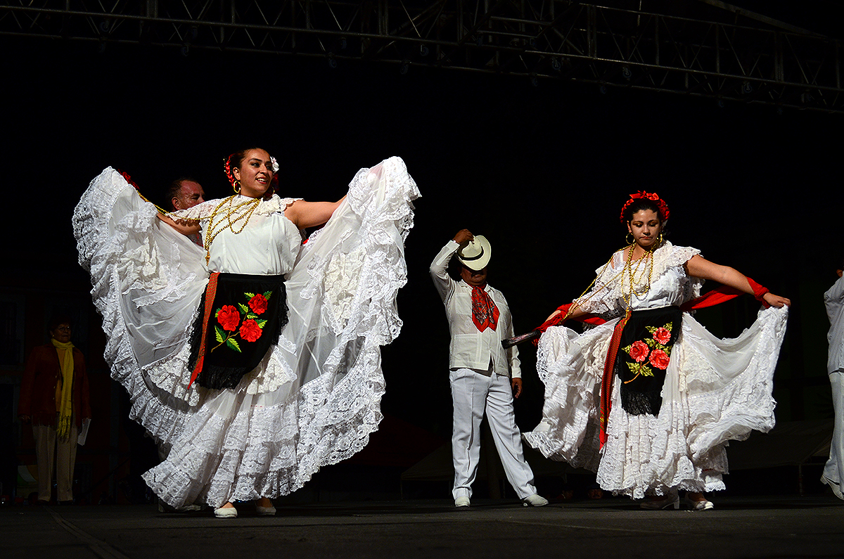 Danza folklórica del estado de Veracruz